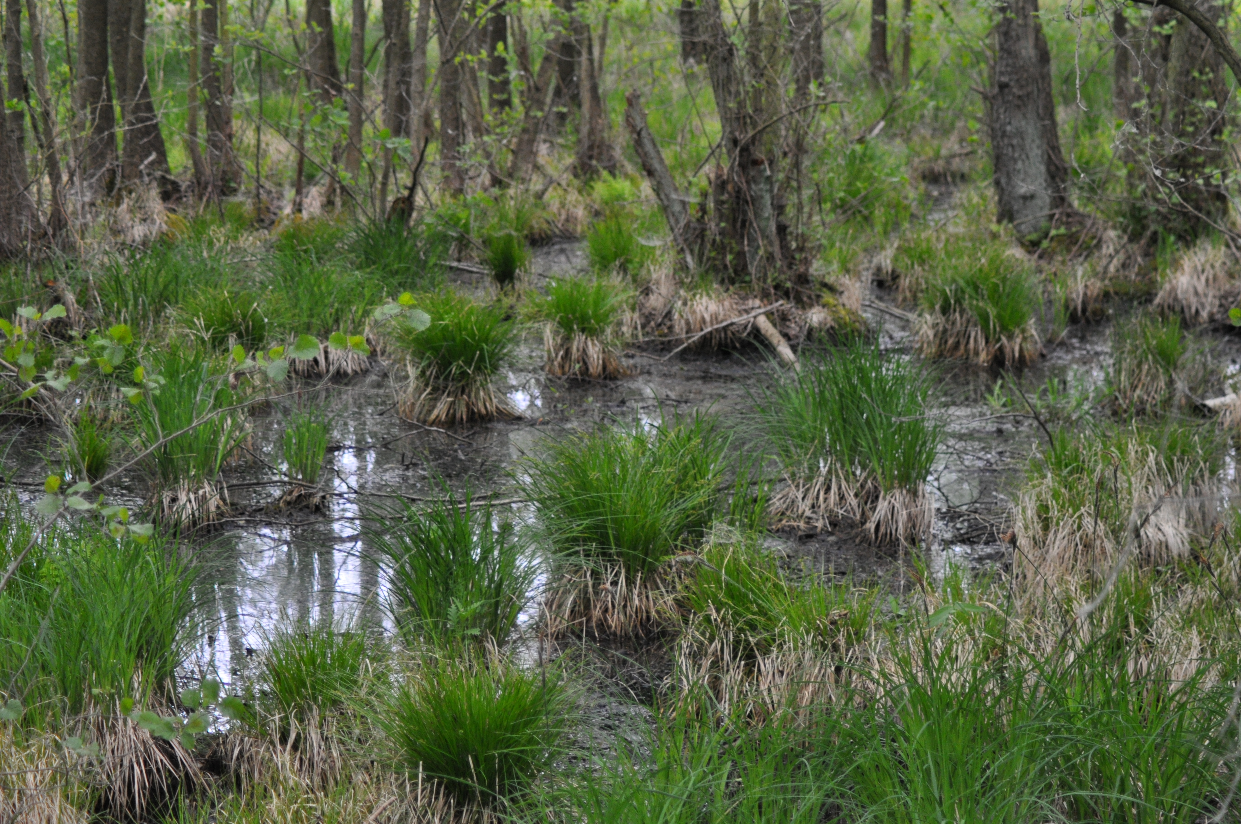 Dieses Bild zeigt ein Moorgebiet im Röbelscher Wald auf dem Wanderweg vom Schwarzenhof nach Boek.